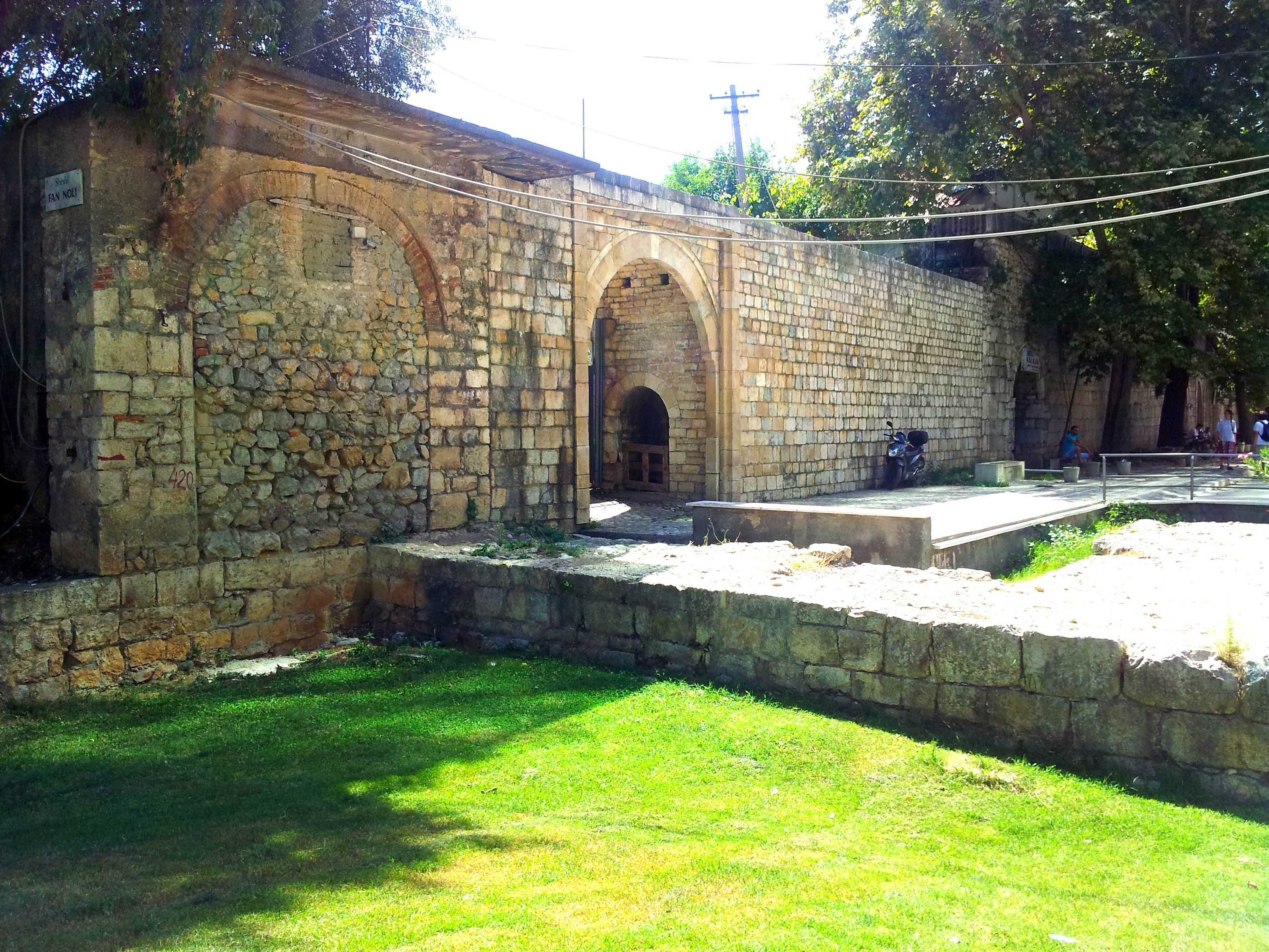 Kalaja e Tiranes është monument kulture i kategorisë së parë